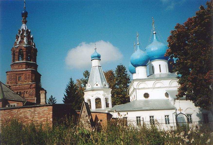 Троицкая церковь в Чашниково (сельское поселение Лунёвское), Московская область